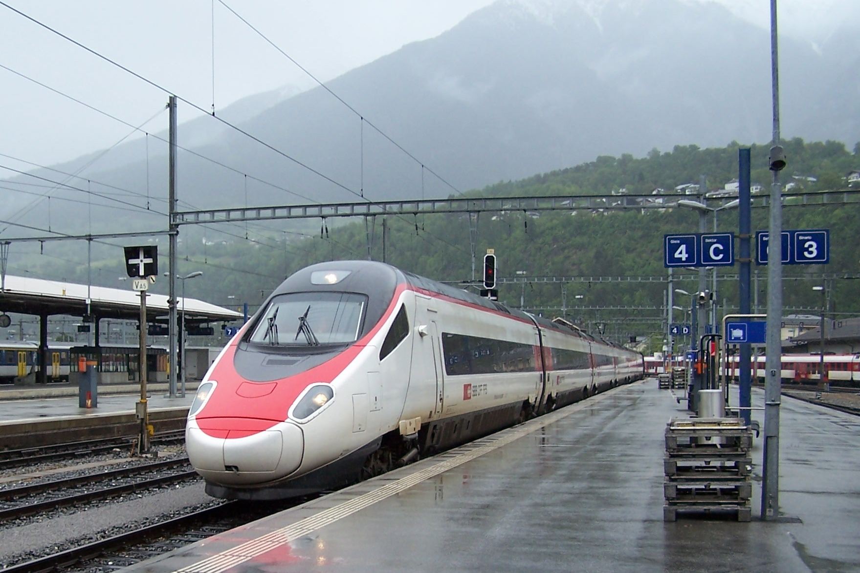 ETR 610 bei der Einfahrt in Brig